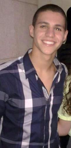 אור טרגן